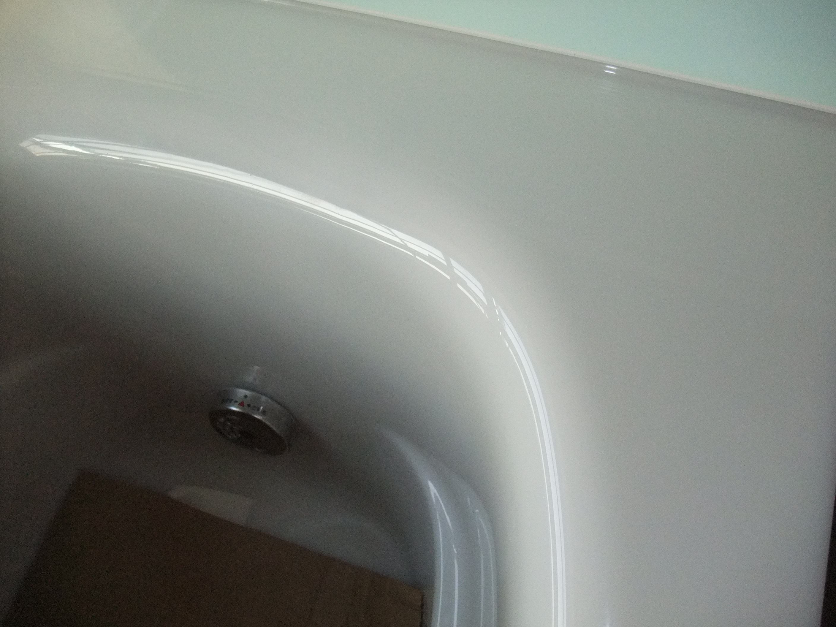 パナソニックの人工大理石製のバスタブ。透明な層を表面にもつ製品。